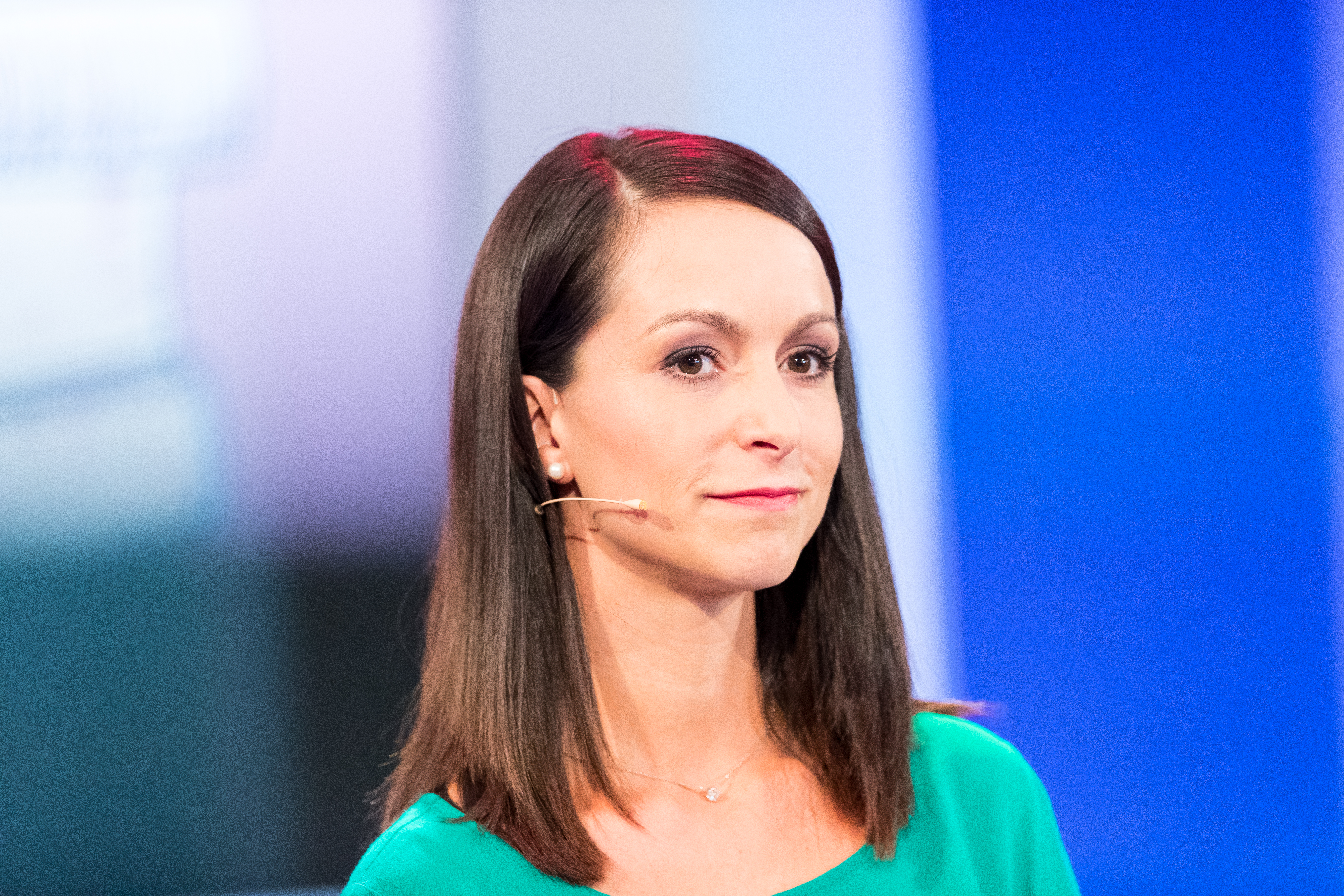 Alexandra Kröber during Frankfurter Buchmesse at Messe Frankfurt, Frankfurt, Hessen, Germany on 2018-10-13, Photo